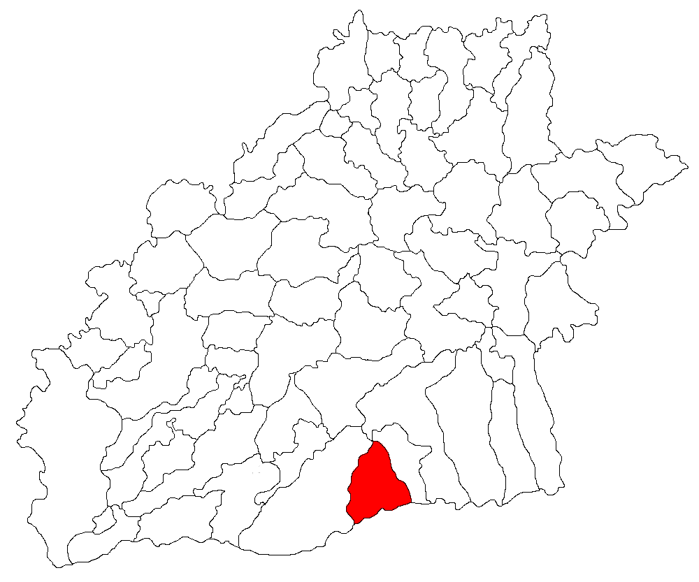 Categorie:Hărţi ale judeţului Sibiu